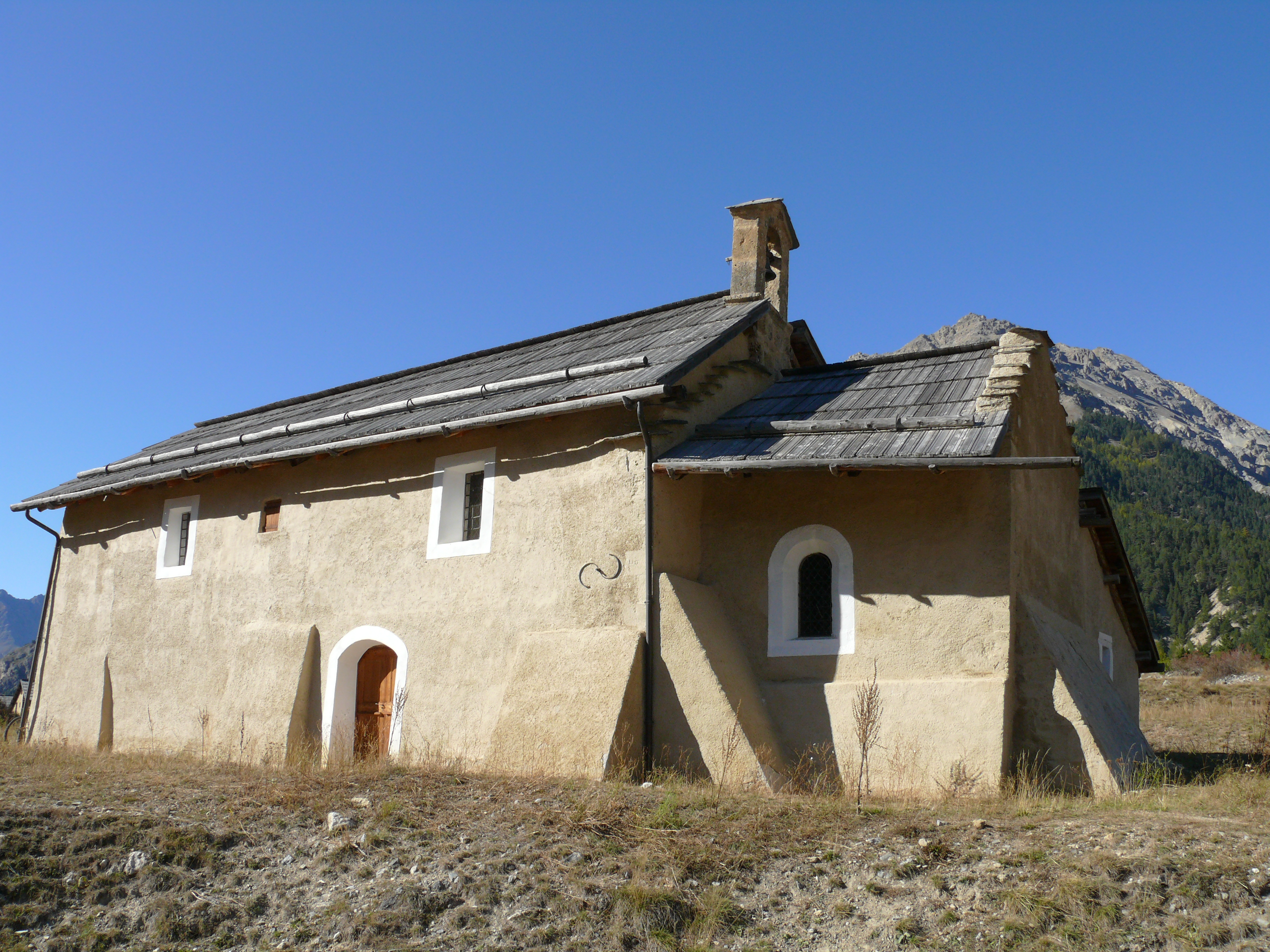 Névache - Vallée de la Clarée - Chapelle Saint-Hippolyte de Roubion